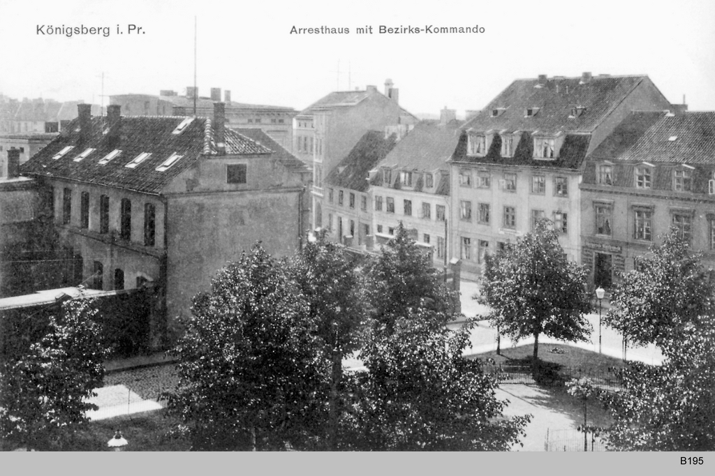 Königsberg